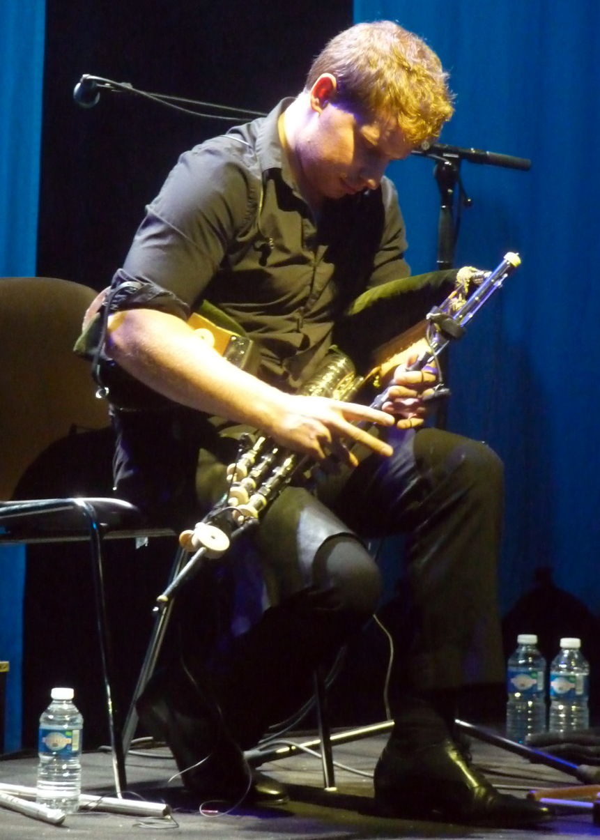 Joueur irlandais de pipe en 2015